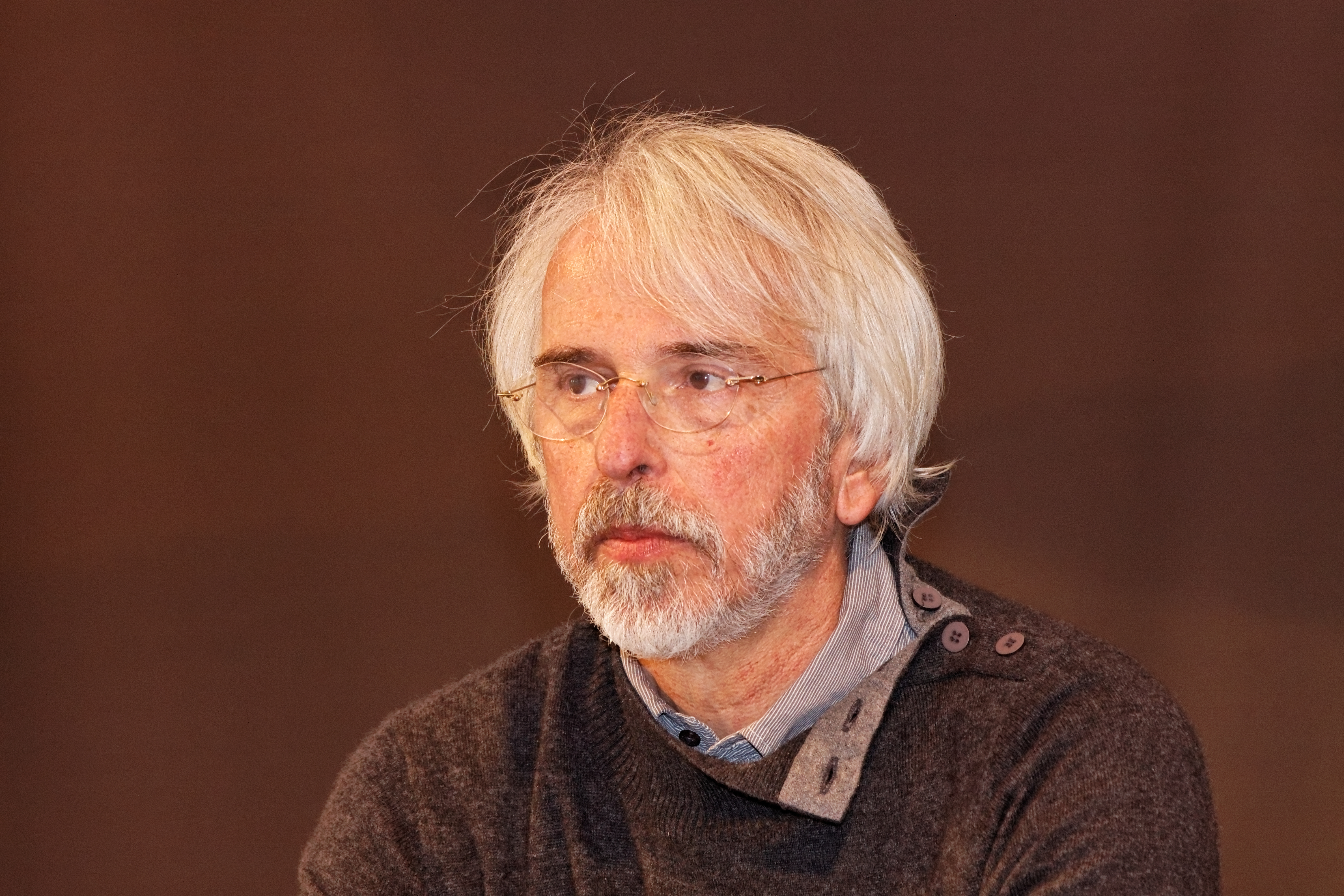 Philippe Delerm en conférence.